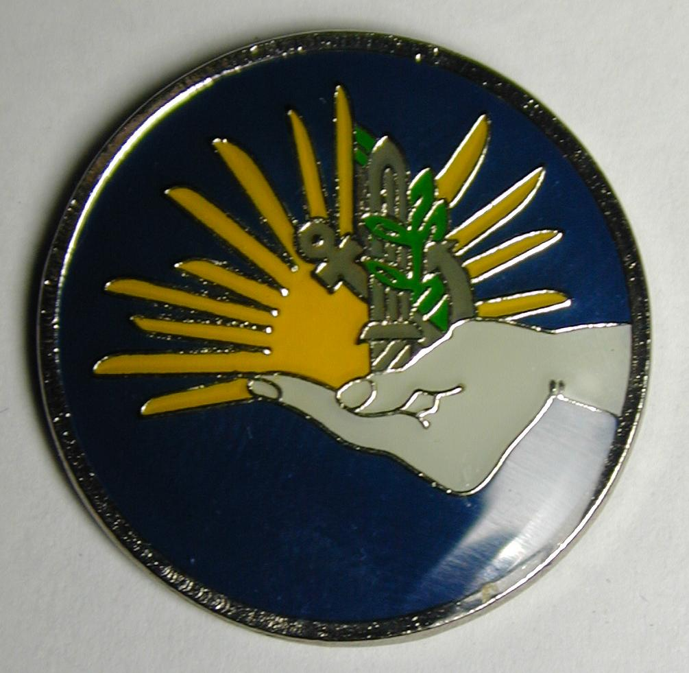 סמל של מנהל נפגעים וקציני ערים